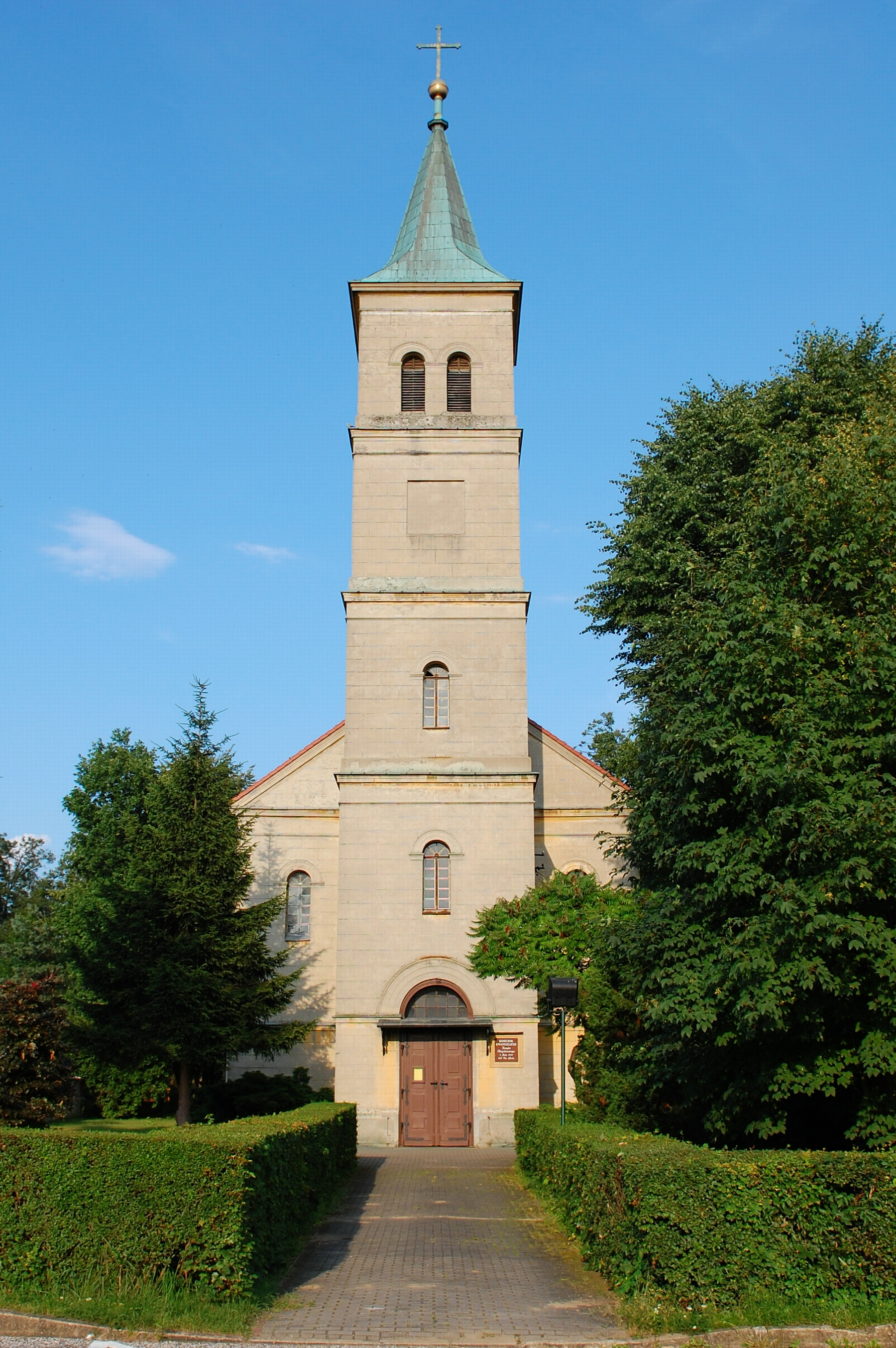 Olesno, kościół ewangelicki, 1851-1853